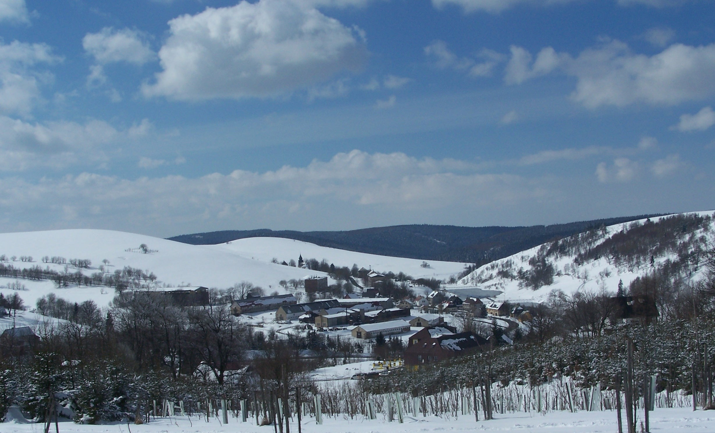 Moldava (Moldau), Czech Republic